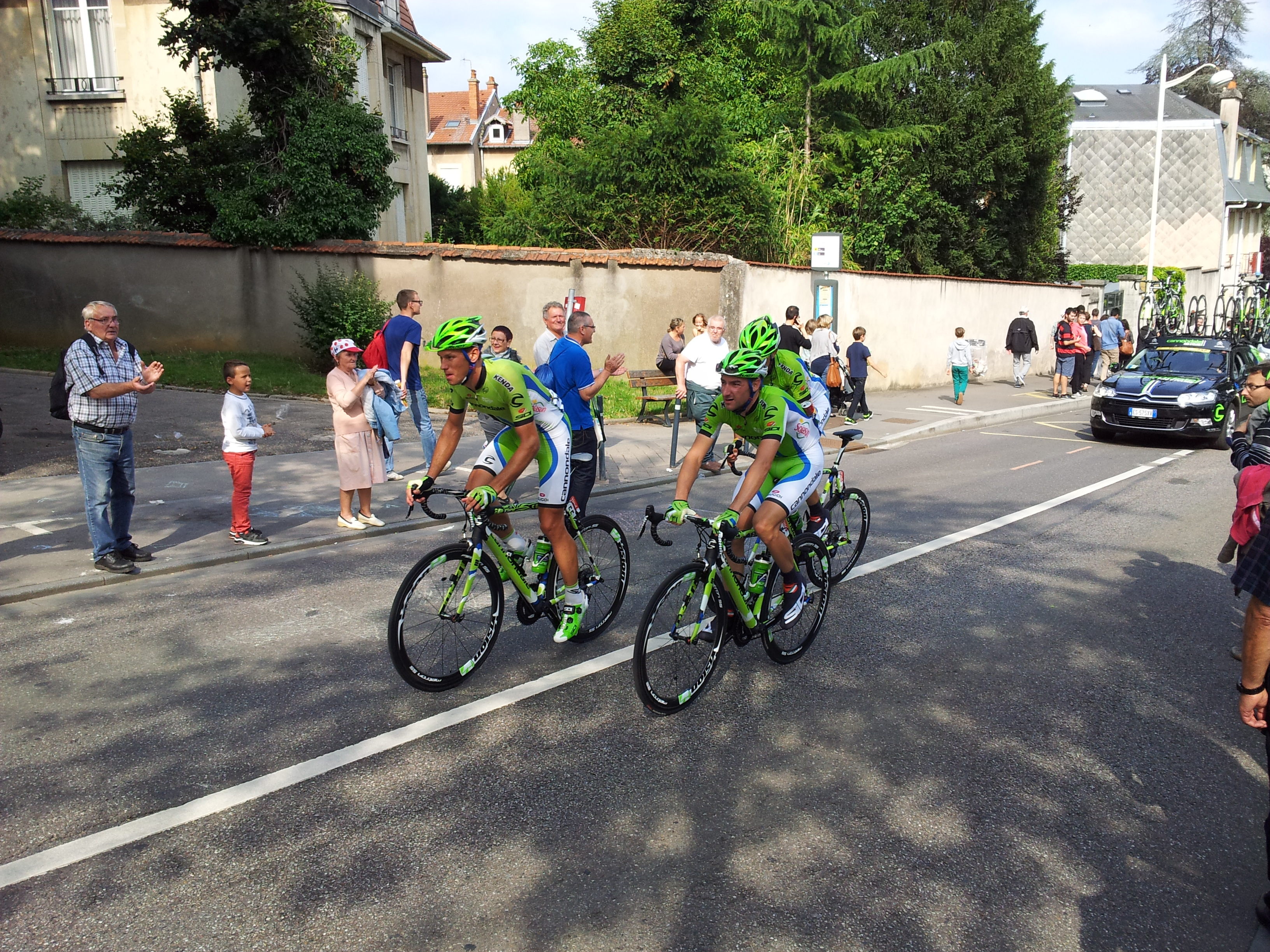 7e étape du Tour de France 2014 au début de la Côte de Boufflers.